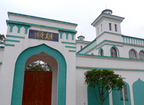 长沙汉回村清真寺